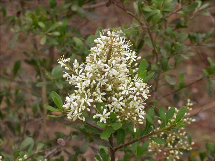 Sweet Bursaria (Bursaria spinosa)